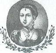 Judyta z Węgier